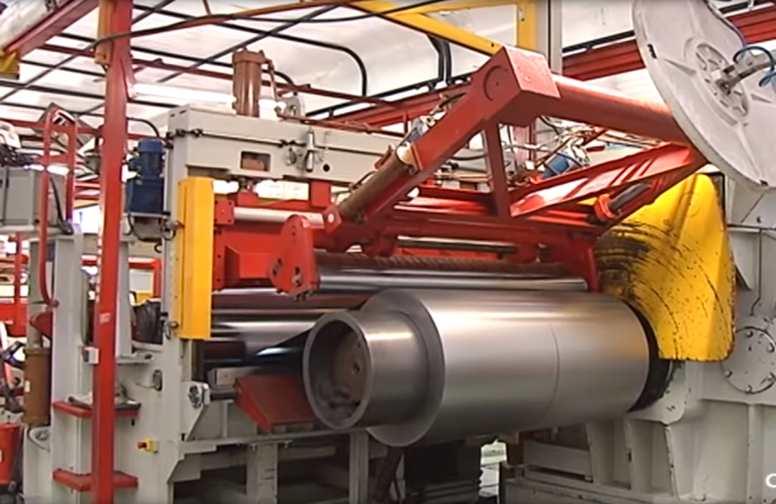 50 aniversario de Gonvarri Burgos.